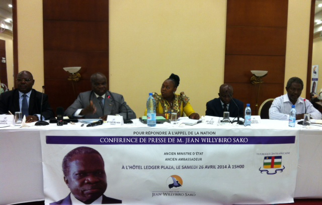 Conférence de presse JWS Bangui 26/04/14